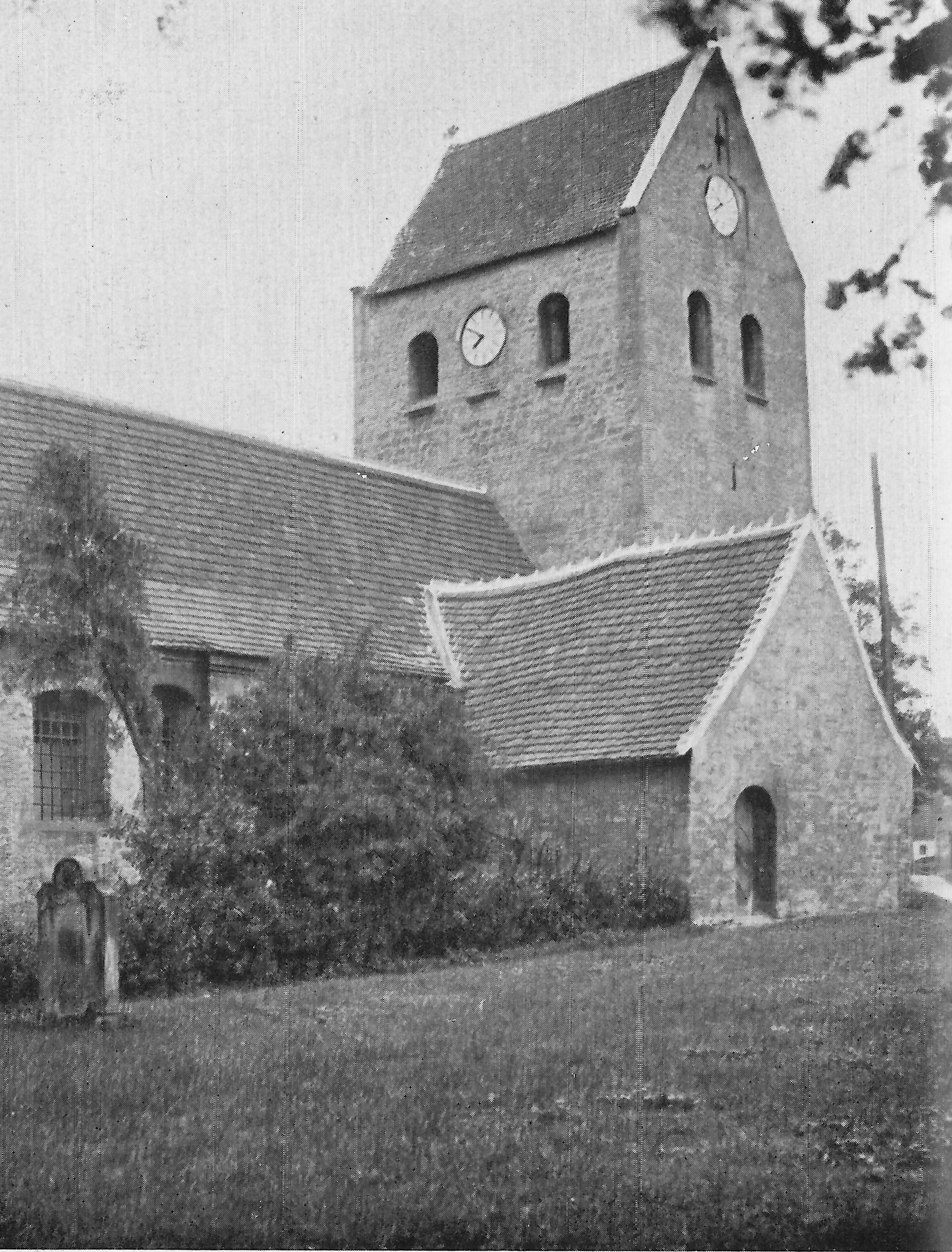 Dorfkirche in Beyendorf, 1935 oder früher, Das Bild wurde 1935 im Buch von Eduard Stegmann, Aus dem Volks- und Brauchtum Magdeburgs und der Börde, Magdeburger Kultur- und Wirtschaftsleben Nr. 4, Herausgegeben von der Stadt Magdeburg, Seite 55 veröffentlicht.